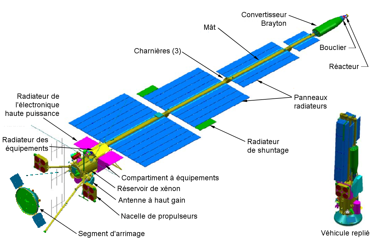 Véhicule Prometheus 1 pour la mission JIMO